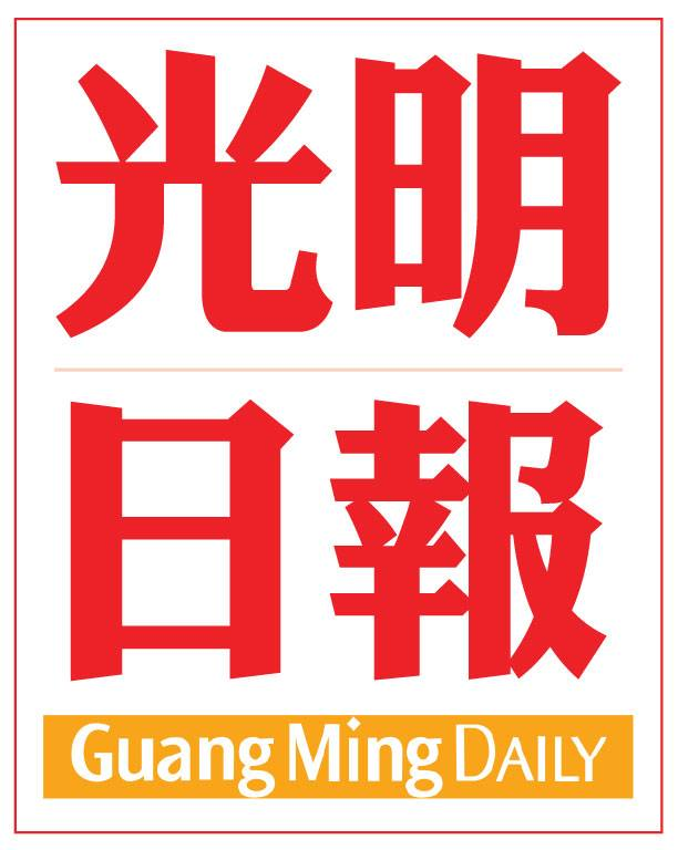 中文（马来西亚）: 光明日報Logo